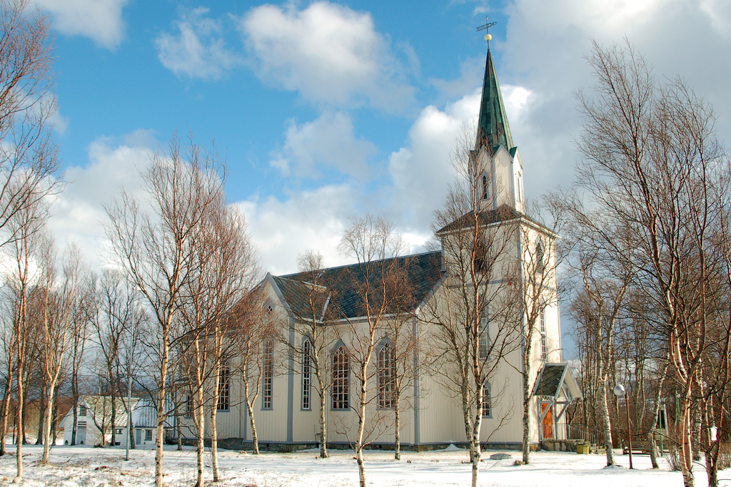 Saltstraumen church, front.